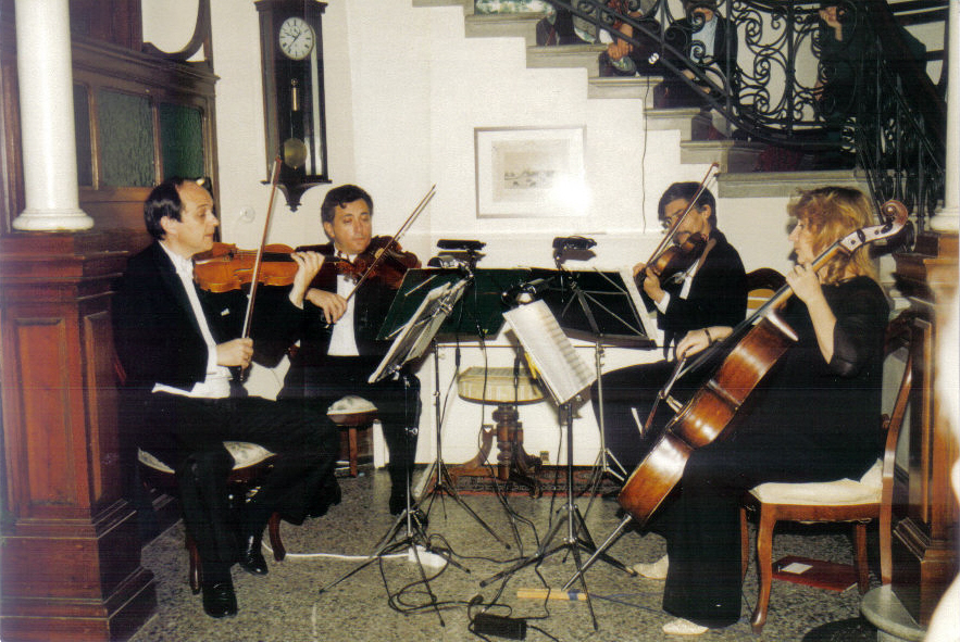 de la stânga la dreapta: Ioan Fernbach (vioara I), Mircea Tătaru (vioara a II-a), Constantin Haţeg-Turcuş (violă), Alexandra Guţu (violoncel)